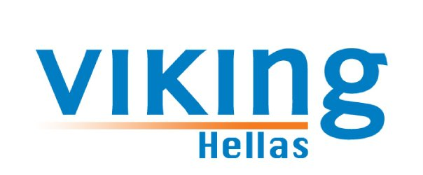 Logo der Viking Hellas